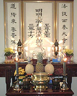 Yiguandao altar.